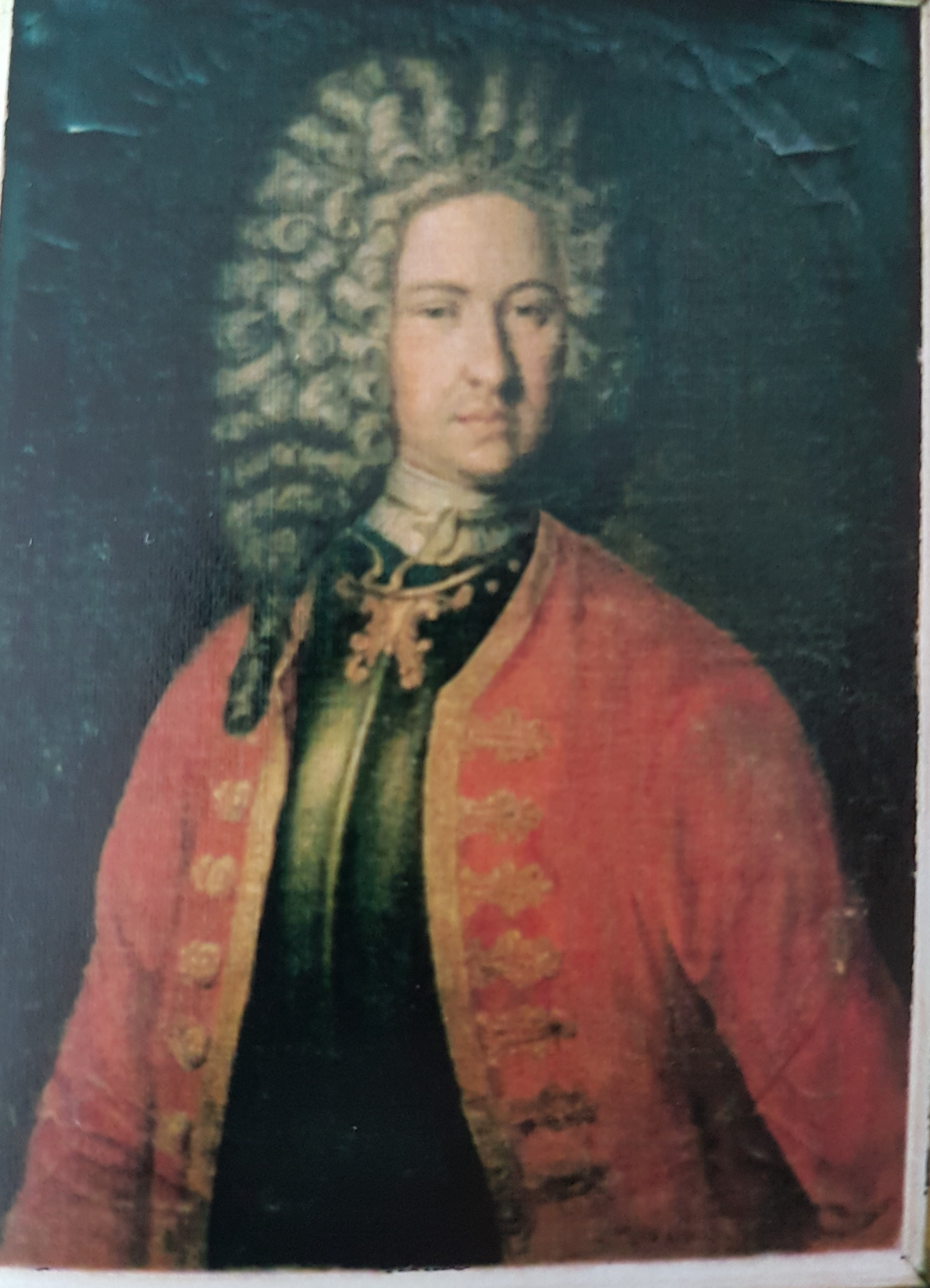 Maximilian II Frhr von Pelkhoven